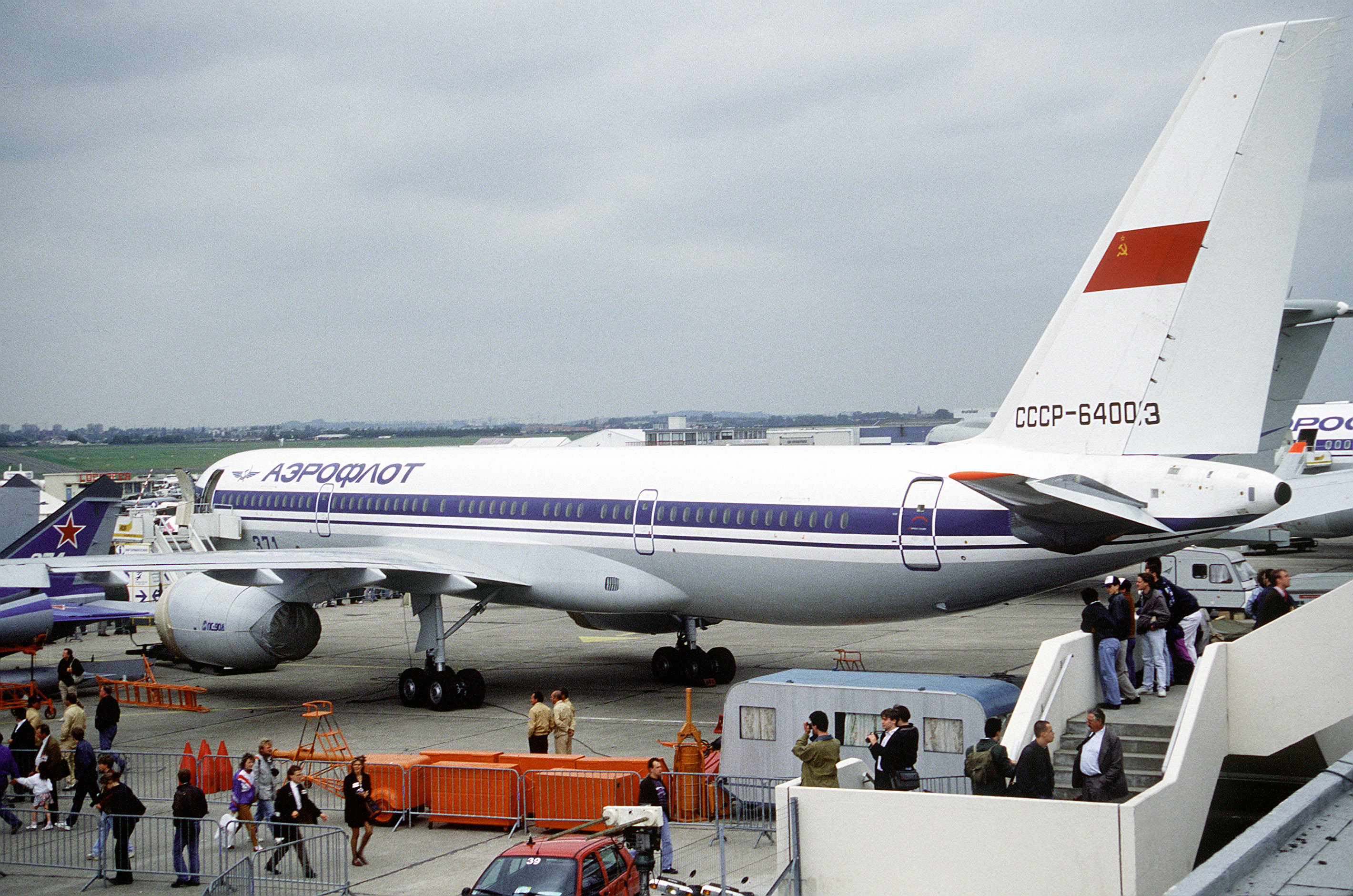 Ein Transportflugzeug der Fluggesellschaft Aereoflot vom Typ Tupolev Tu-204 auf der Luftfahrtschau in Paris im Juni 1991